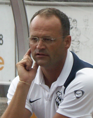 İrfan Buz im Geisweider Hofbachstadion im Juli 2010